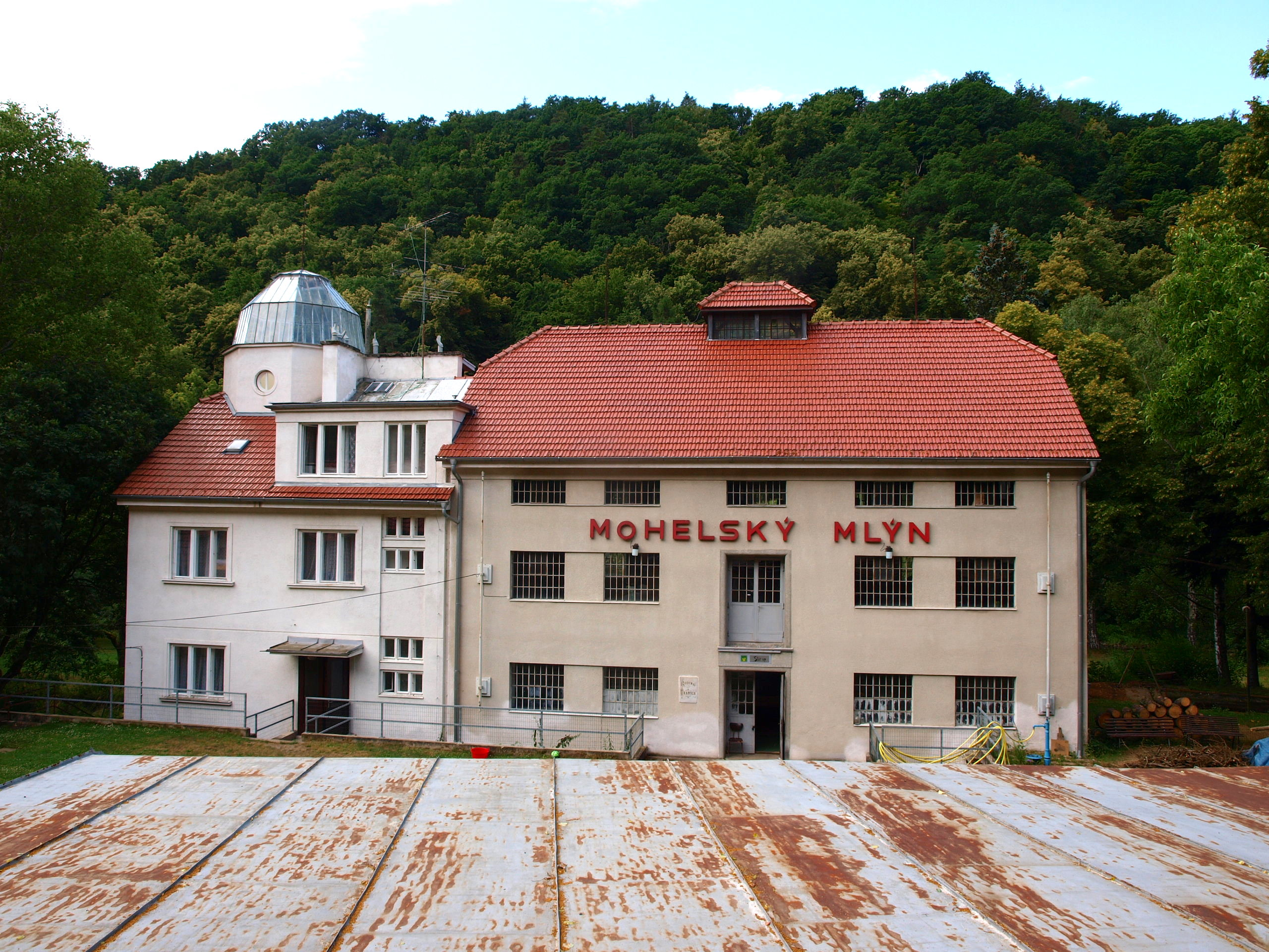 Mohelská hadcová step